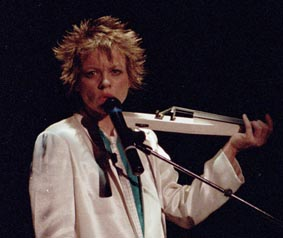 Laurie Anderson in De Vereeniging te Nijmegen